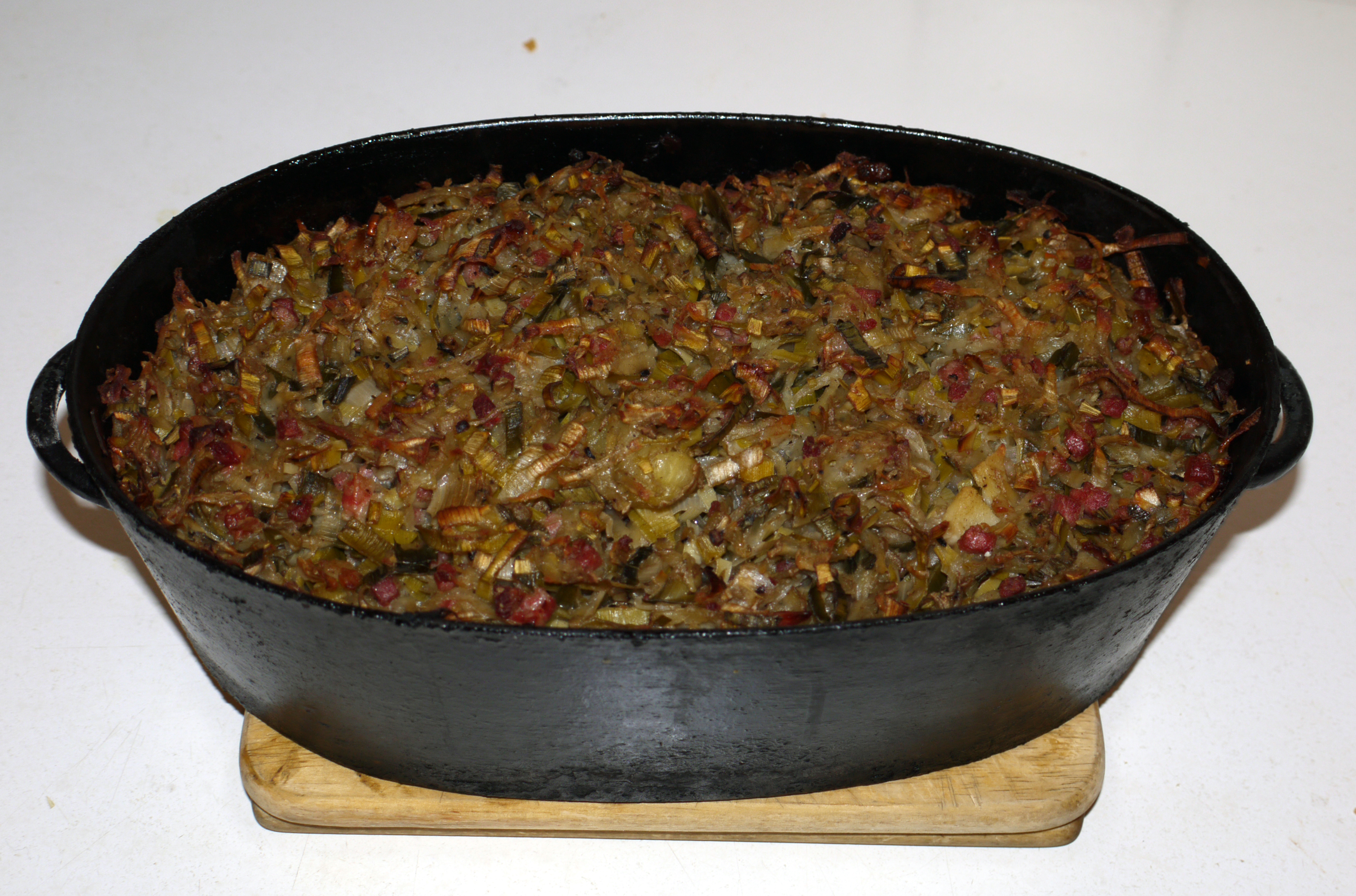 Bildinhalt: Schwarzer gusseiserner Bräter gefüllt mit Schales. Aufnahmeort: Baden-Baden, Deutschland Aufnahmetag: 2010-01-30 Fotograf: Susanne Kauz, Mannheim Uploader: Frank C. Müller, Baden-Baden